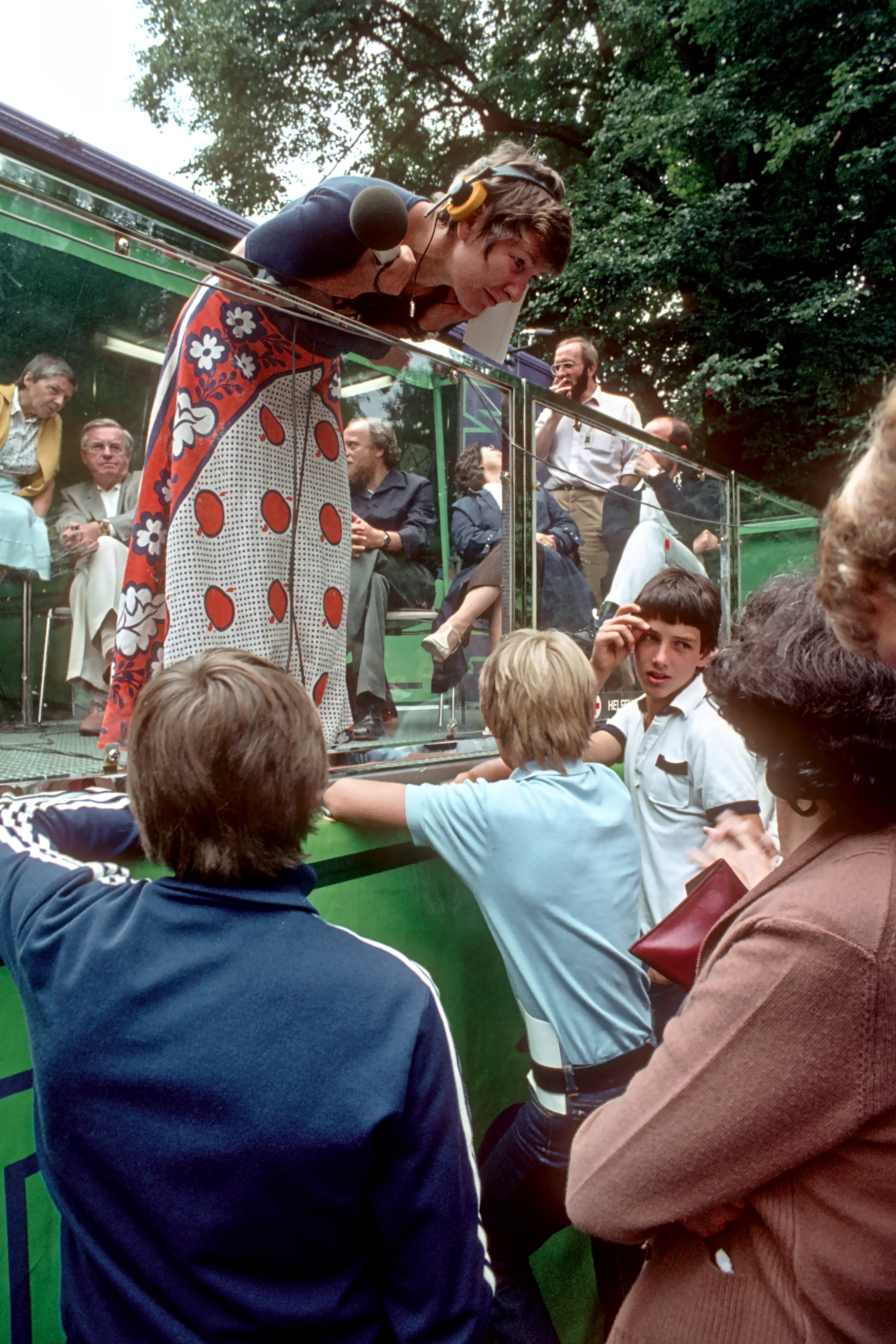 WDR-Hörfunksendung Hallo "Ü-Wagen" am 29.07.1982 in Bad Oeynhausen. Thema "Den Schnecken auf der Schleimspur". Moderatorin Carmen Thomas.